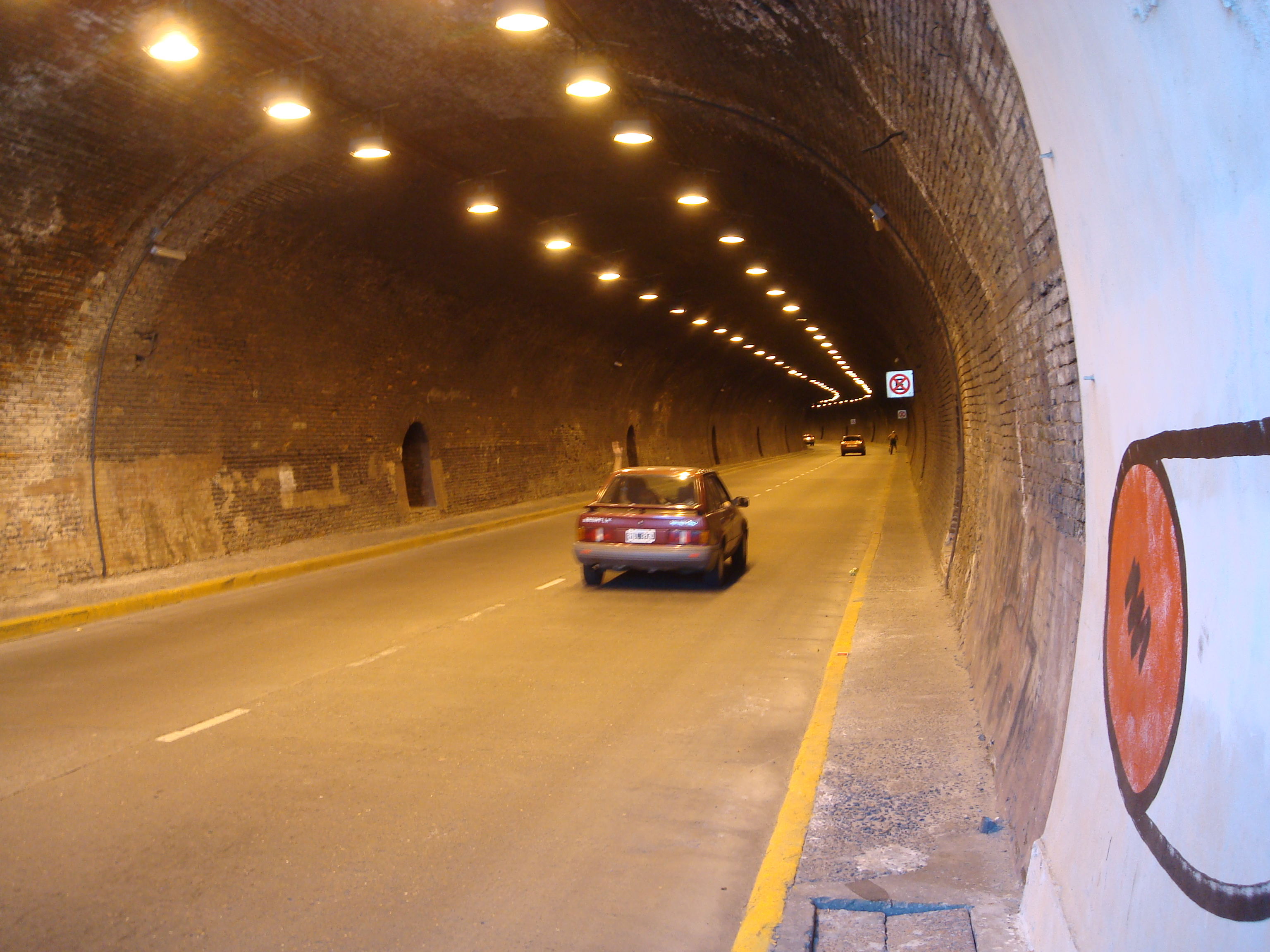 Antiguo tunel ferroviario utilizado por los trenes de carga hasta 1972, desde calle Sarmiento hasta la antigua Estación Rosario Central del FFCC Gral. Mitre, en la ciudad de Rosario, Argentina. En la actualidad ha sido acondicionado para el tránsito vehicular, prolongando la avenida costanera debajo del Parque de España.